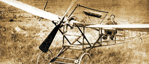 Dimitri Sensaud de Lavaud, aviador, inventor e engenheiro francês, radicado em Osasco, Brasil, no primeiro vôo de um avião na América Latina (7 janeiro de 1910).